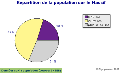 section Démographie. Auteur : Assemblée Pyrénéenne d'Economie Montagnarde. Oeuvre personelle.